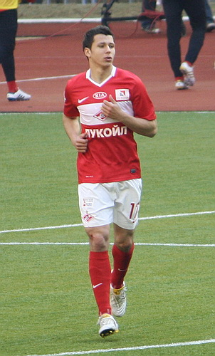 Marek Suchý